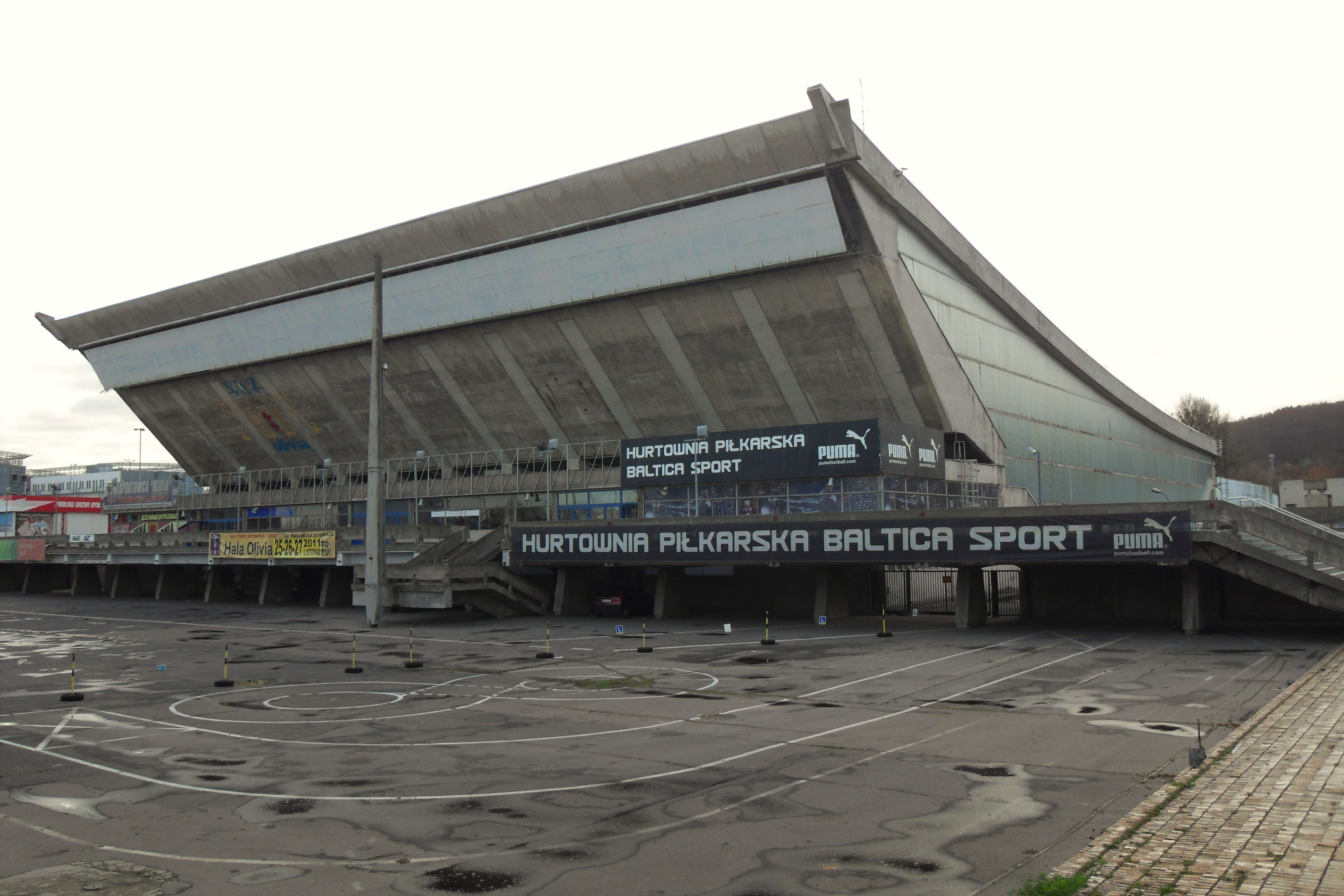 Gdańsk Oliwa. Hala Olivia.